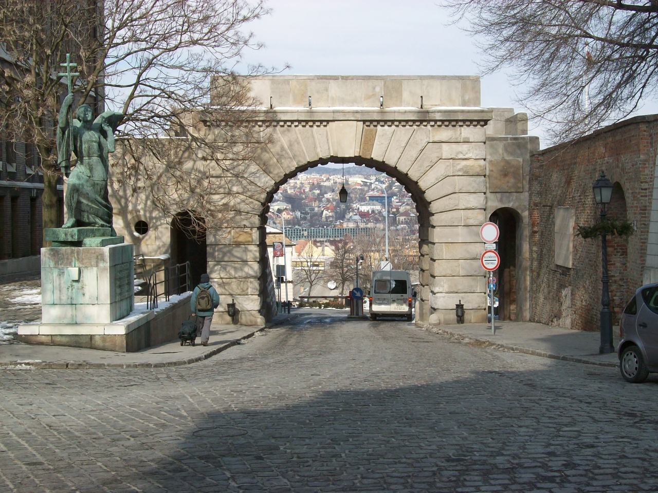 A Bécsi kapu. Az 1896-ban lebontott középkori Szombat-kapu helyén épült 1936-ban Kismarty-Lechner Jenő tervei szerint. A Rohanó angyal című szobor Ohmann Béla alkotása (1936). Állították Buda visszavételének 250. évfordulója alkalmából